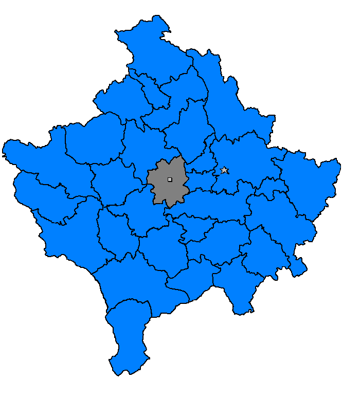 Gllogovc, Kosovë 2006